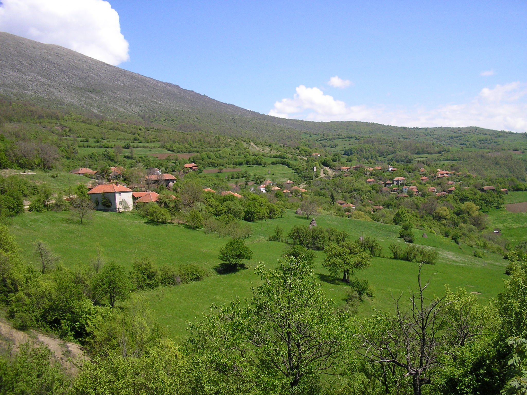 Центар села Штрбовац. Аутор: Славољуб Јовановић.